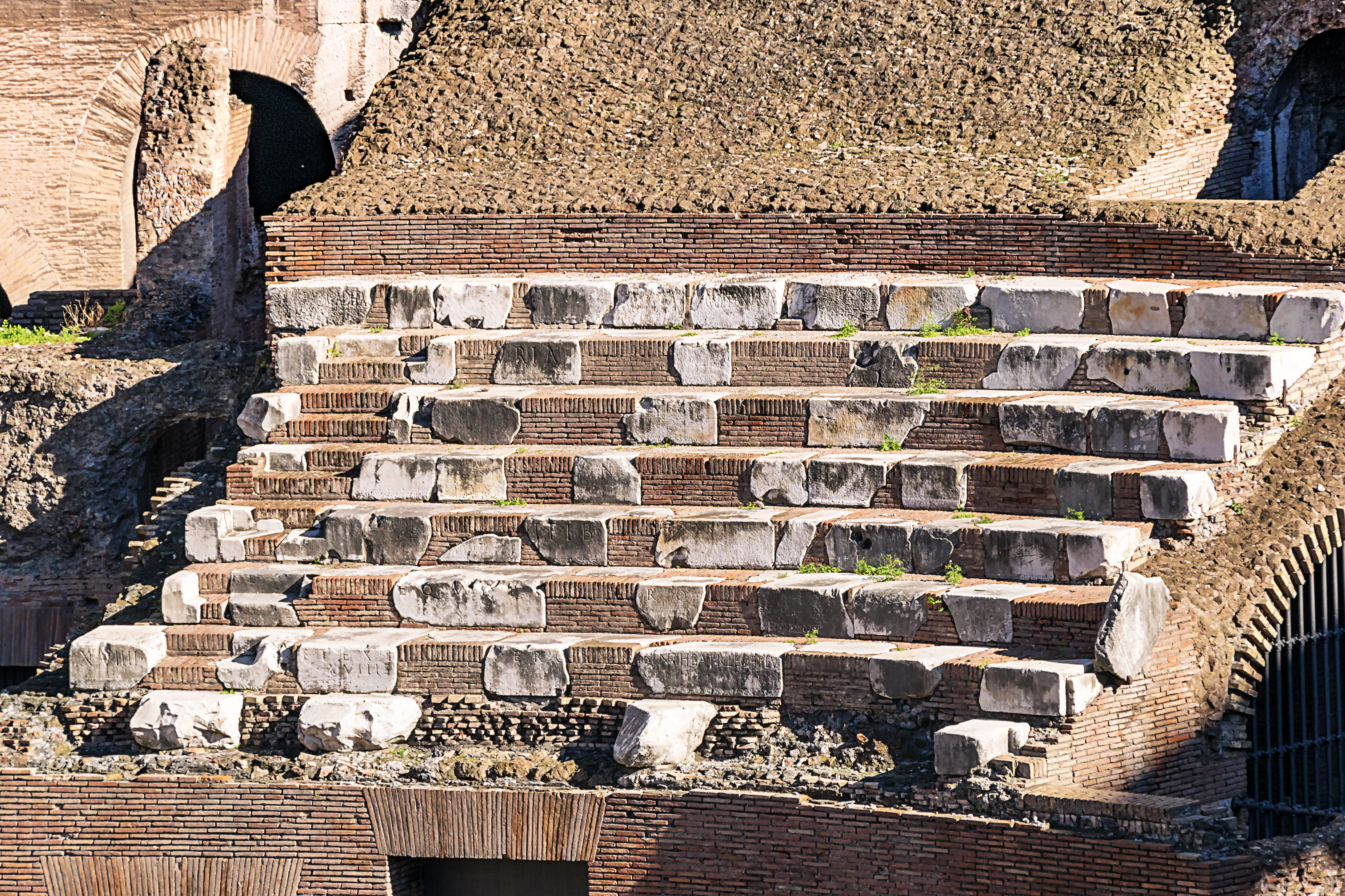 Sitzplatzränge am Osteingang des Kolosseums. In den Stufen sind Inschriftenfragmente vorhanden, die zur Einteilung der Sitzplatzordnung für bestimmte Bevölkerungsgruppen im Kolosseum gedient hatten. Die heute sichtbaren Sitzblöcke stammen ursprünglich aus zeitlich unterschiedlichen Perioden und von verschiedenen Standorten im Kolosseum. Die Blöcke wurden nachträglich, vermutlich nach dem Erdbeben im Jahr 443, in zweiter Verwendung als Spolien an anderen Plätzen verbaut.